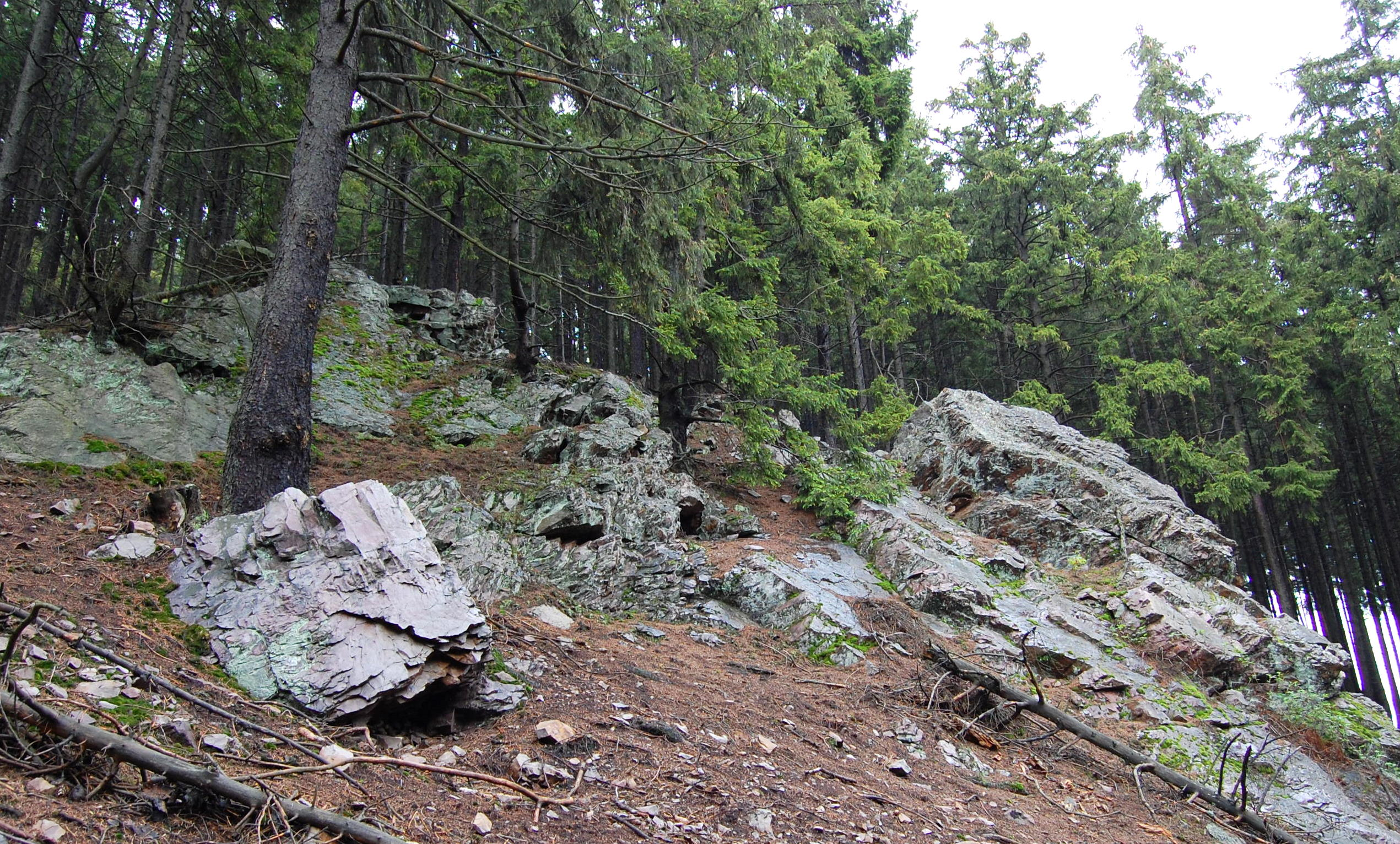 Harschenhöllenklippe am Tänntal im Harz